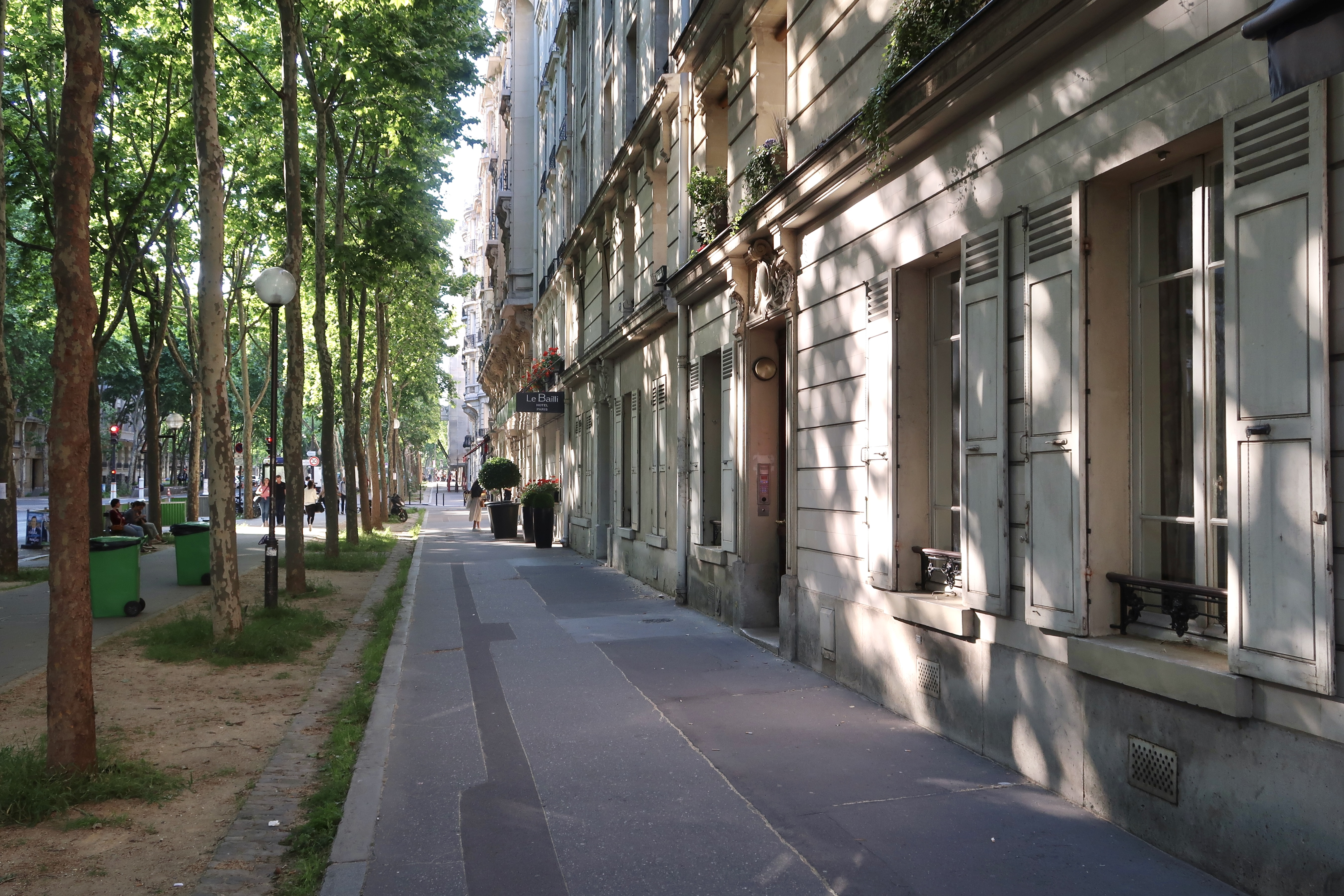 Avenue de Suffren (Paris, 15e).